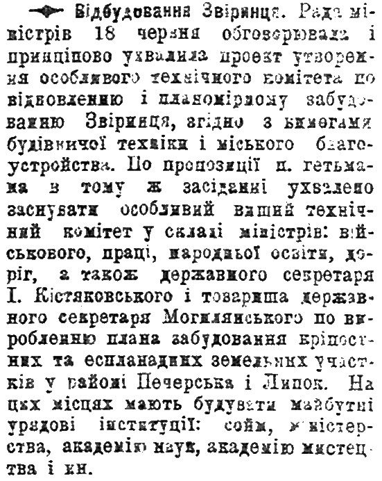 Повідомлення про відбудову Звіринця після підриву артскладів. «Нова Рада», 20 червня 1918.